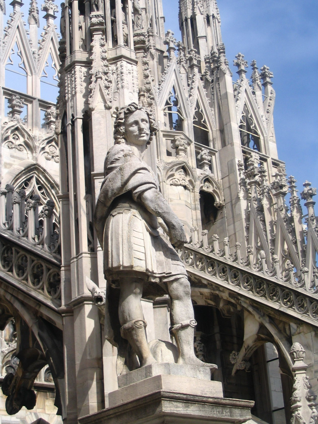 Детаљ са крова Миланске катедрале. Мој поклон Википедији. :)